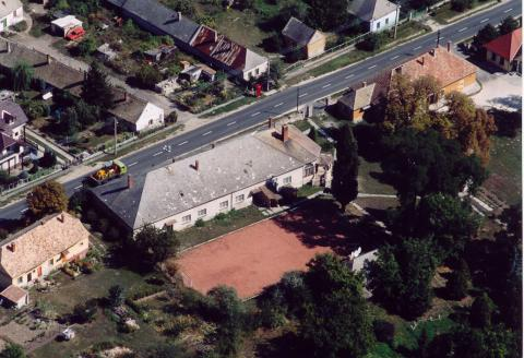 Bakonybánk, Hungary, aerial photography